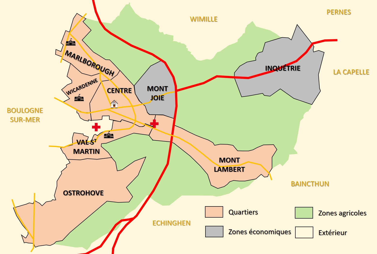 Plan de Saint-Martin-Boulogne (Pas-de-Calais, France)